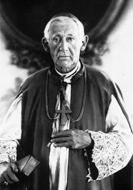 Biskup pomocniczy przemyski Karol Józef Fischer.